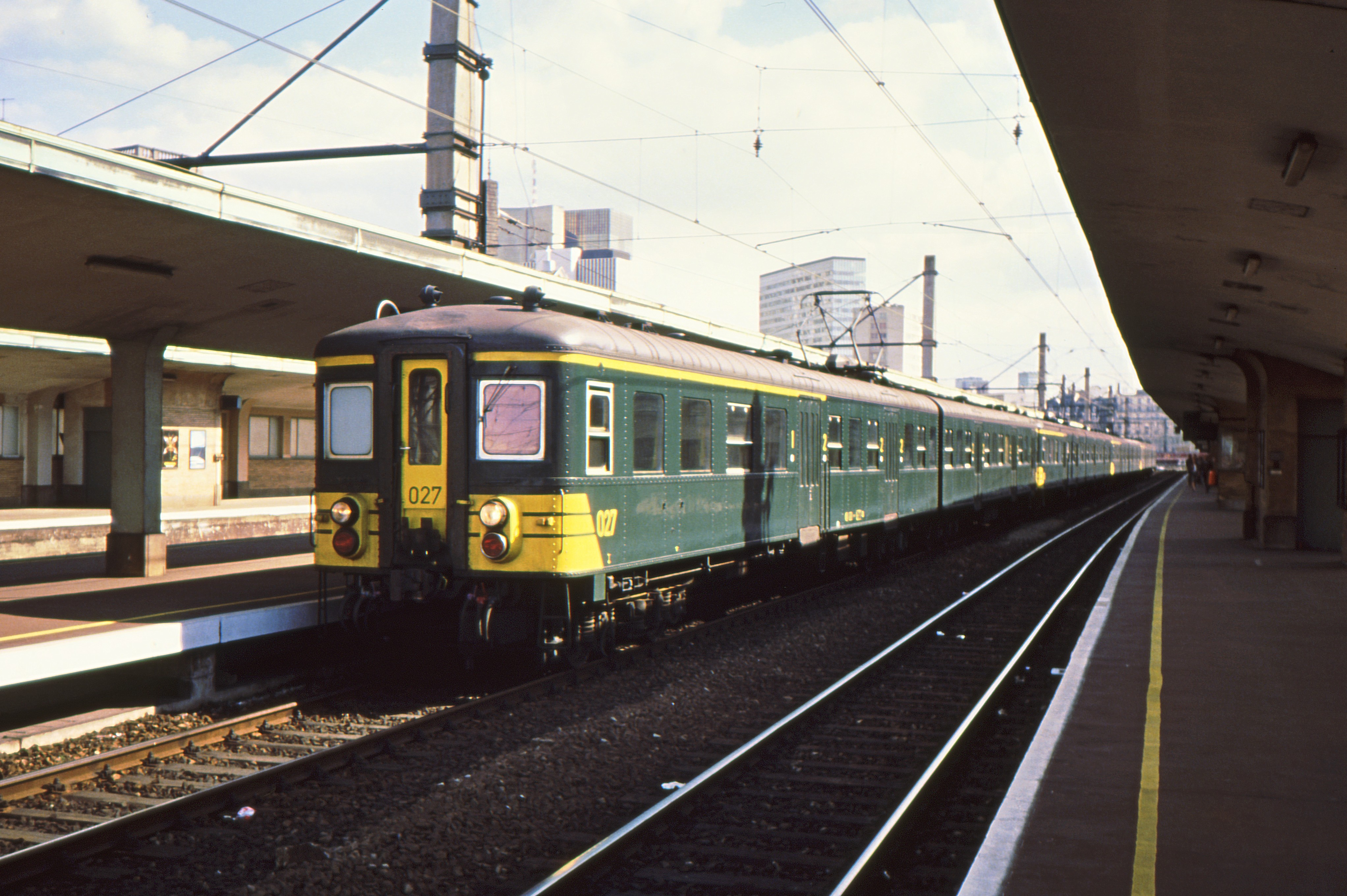 B - NMBS - 3.3. AM1950 - 027 - 1990-05-25 - Brussel-Noord